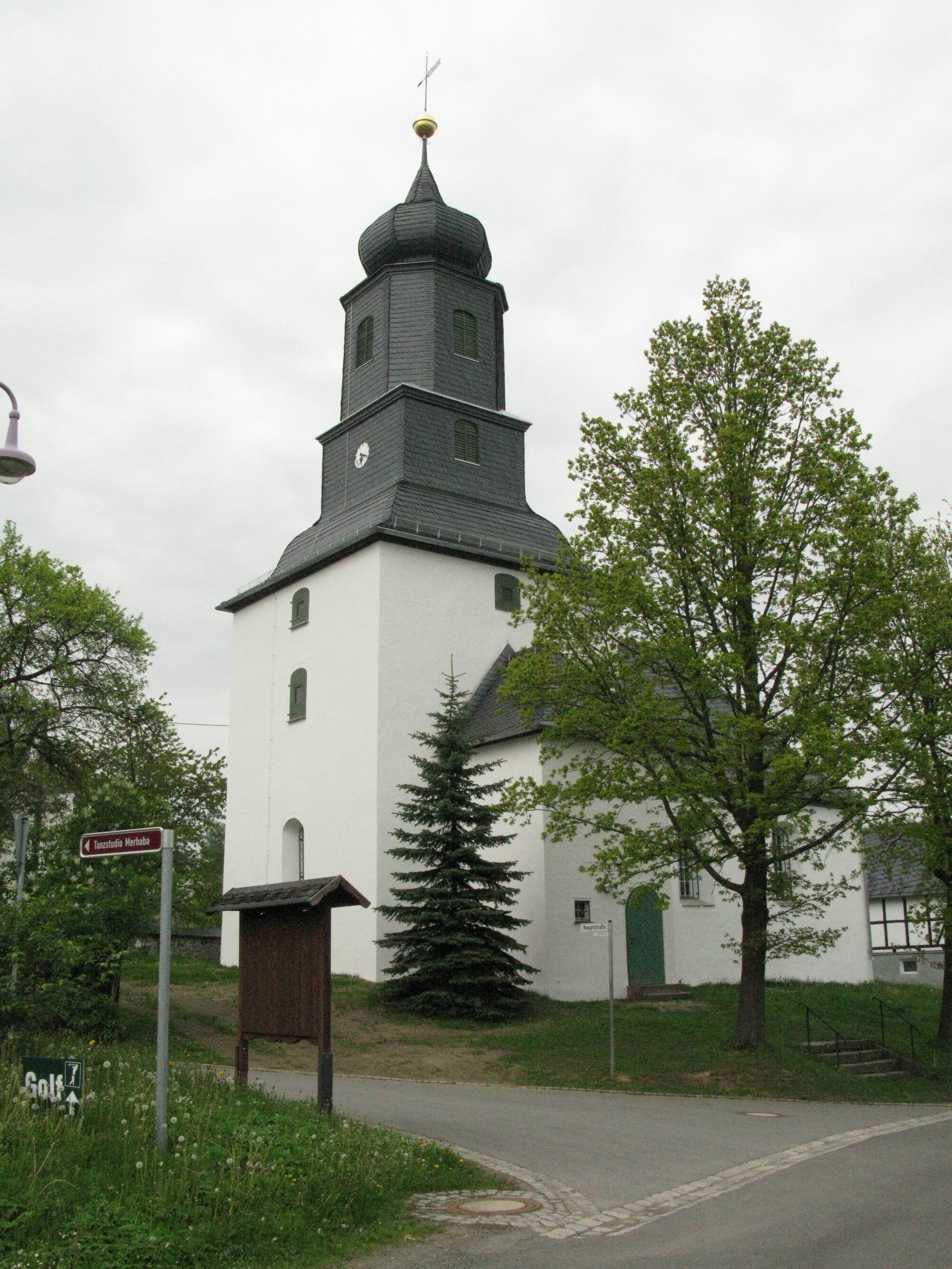 Die Kirche im Plauener Stadtteil Steinsdorf